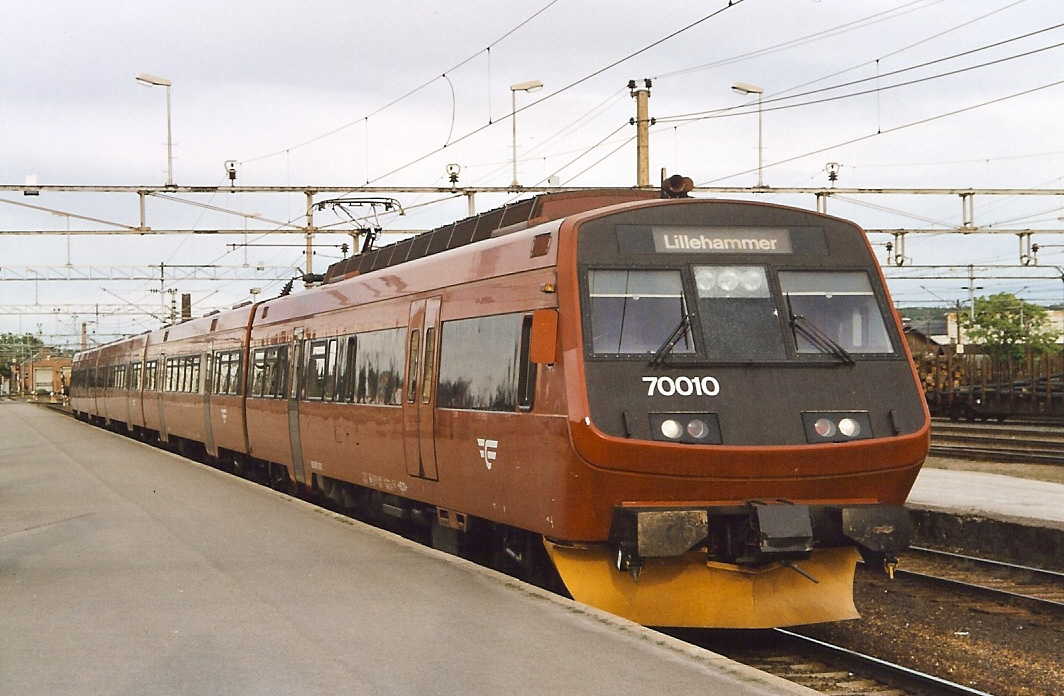 Der Triebzug Typ 70.010 der NSB, aufgenommen im Juni 2001 in Hamar. Durch S.Hinni (eigenes Bild)